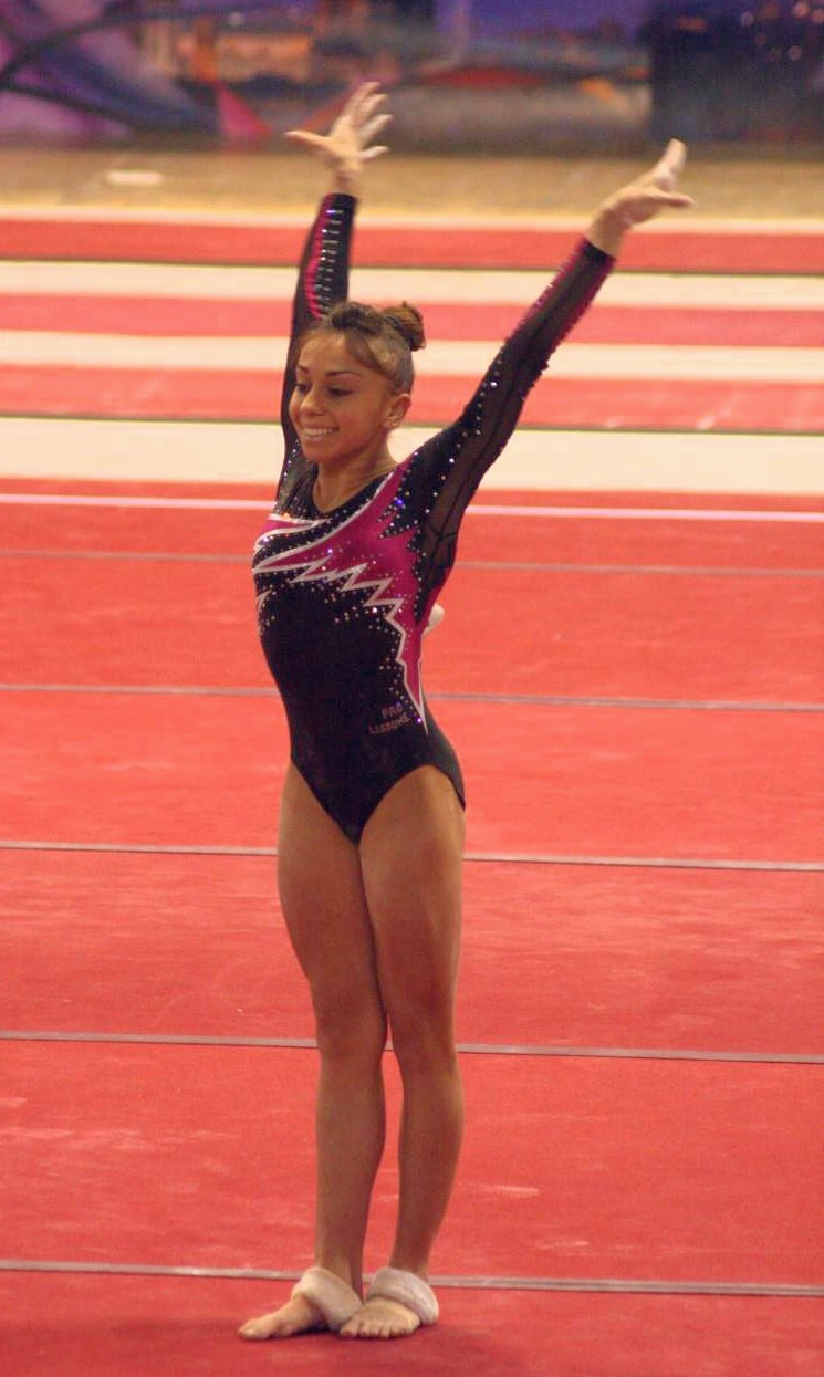 Enus MAriani. Firenze 6 aprile 2013